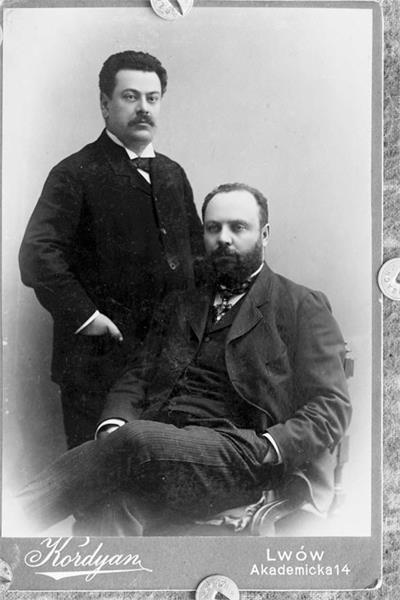 אוסישקין עם אדולף שטנד.